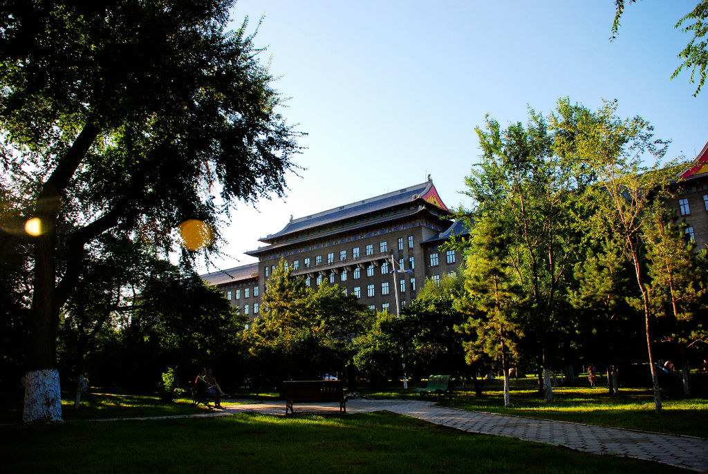 此介绍图为哈军工的21号楼。最为具有当时哈军工的代表性。